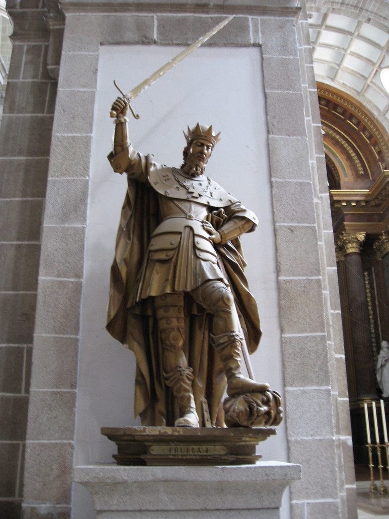 Estatua de Froila I no Mosteiro de San Xulián de Samos en Galicia